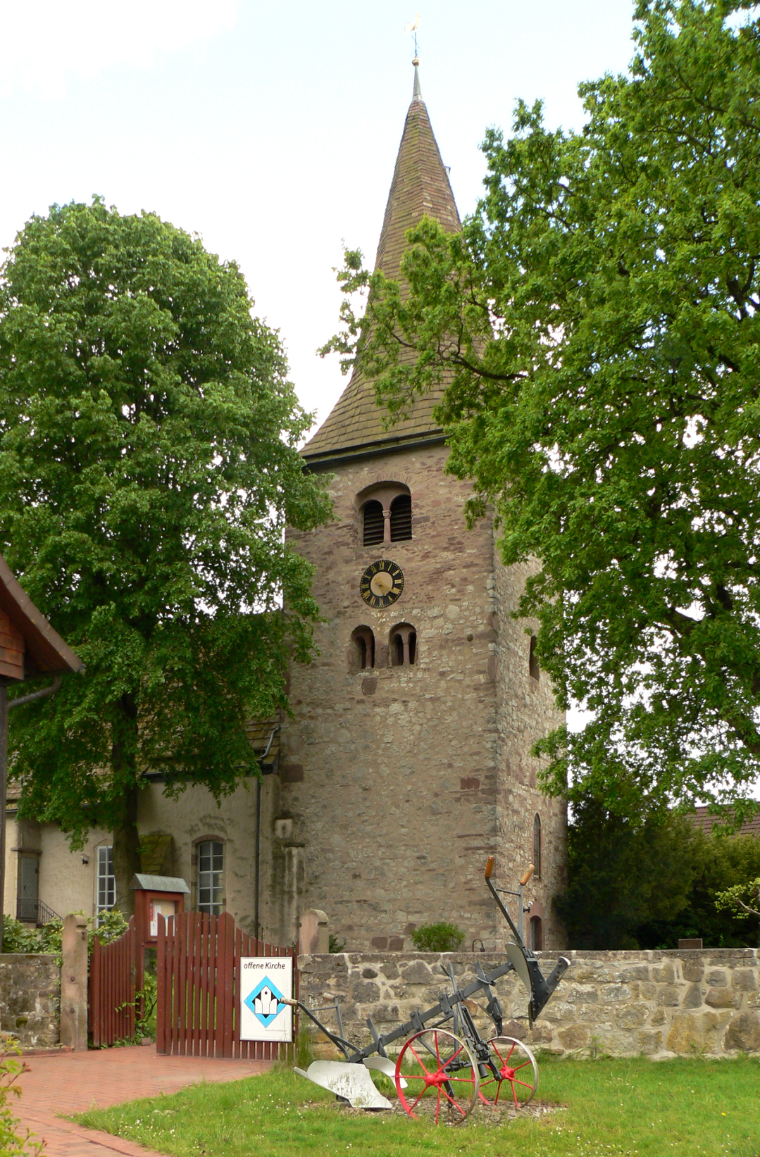 Kirche in Hajen